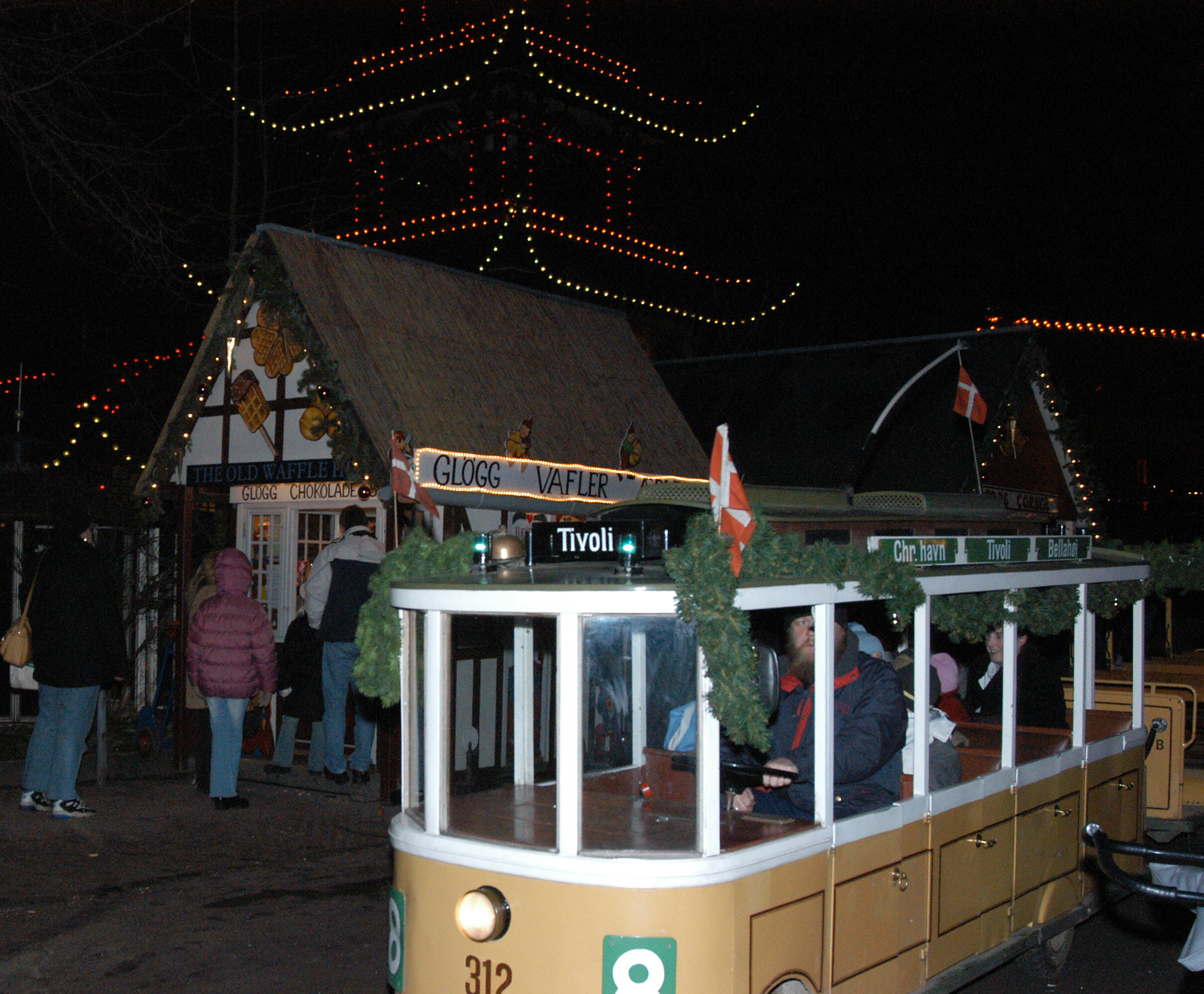 Tivoli in copenhagen: Denmark